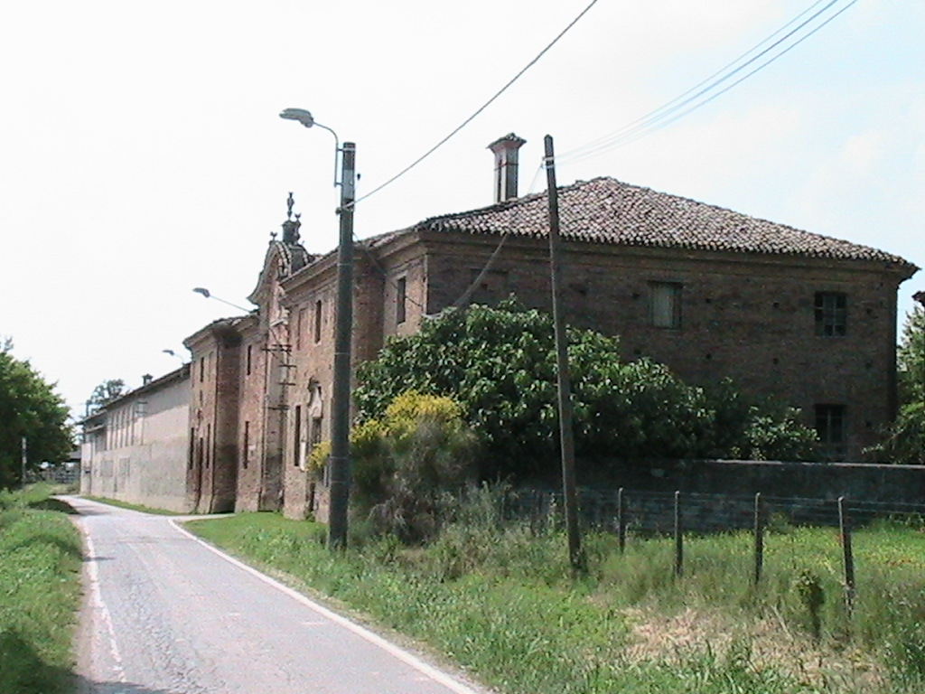 Ca' de' Caggi (Torre de' Picenardi) - Villa Pallavicino - Prospetto dtradale, portale di accesso, chiesa